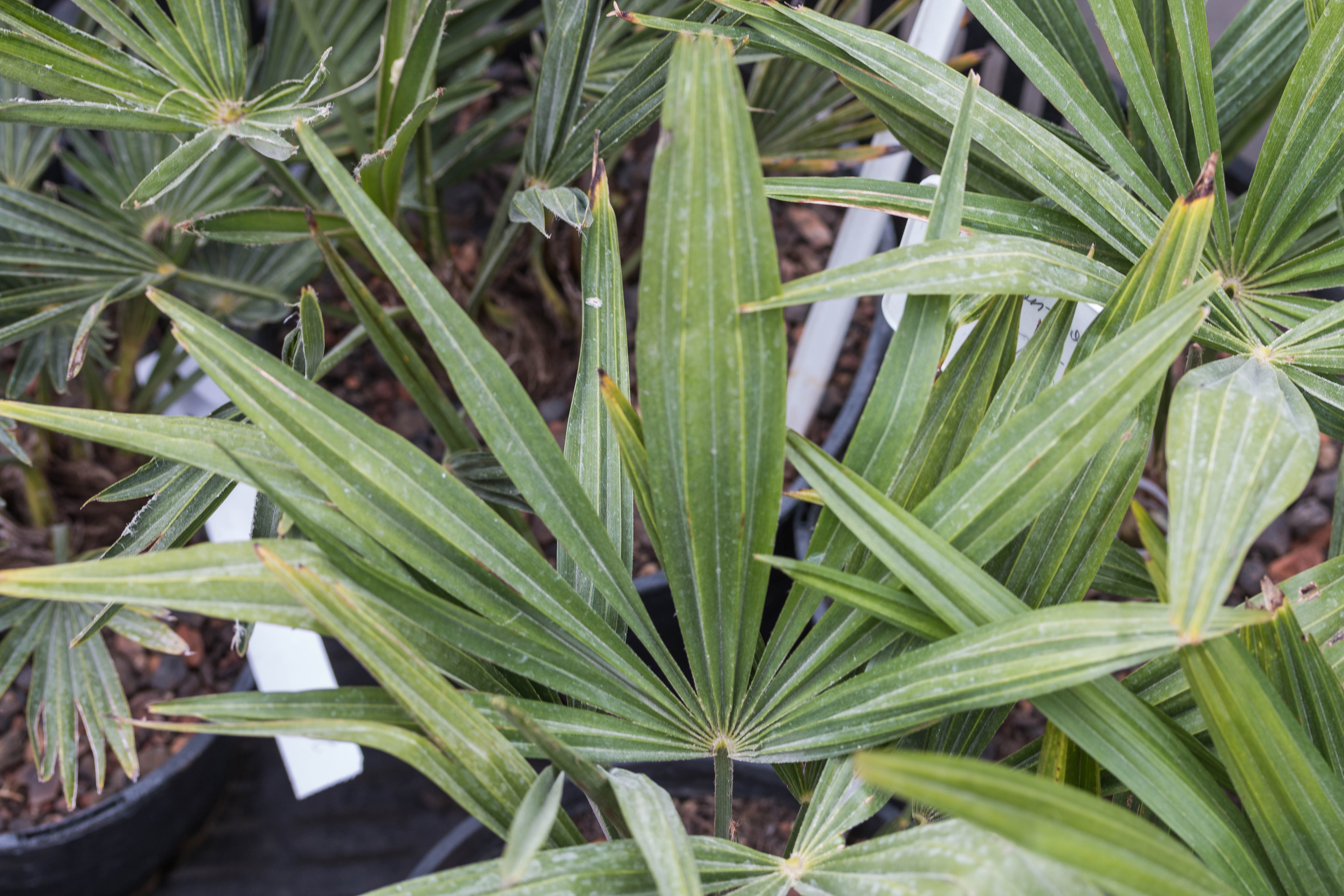 Blatt der Chinesische Hanfpalme